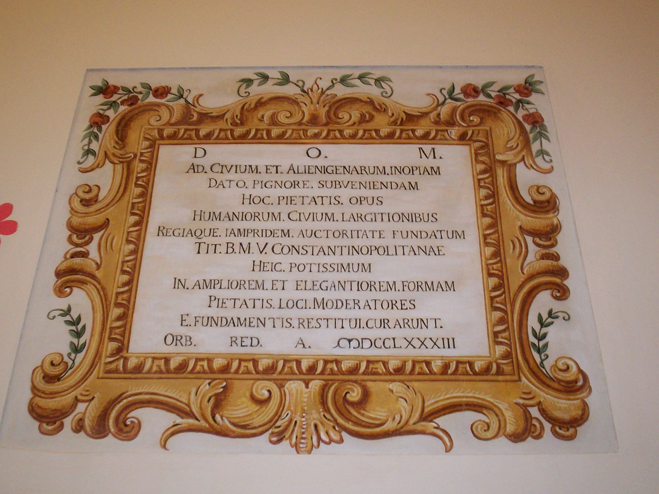 iscrizione nel Monte di Pietà di Cerreto Sannita